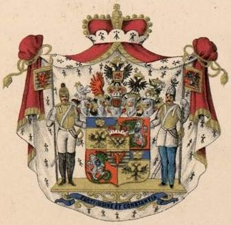 Orlovi suguvõsa vürstivapp (Venemaa keisririik)